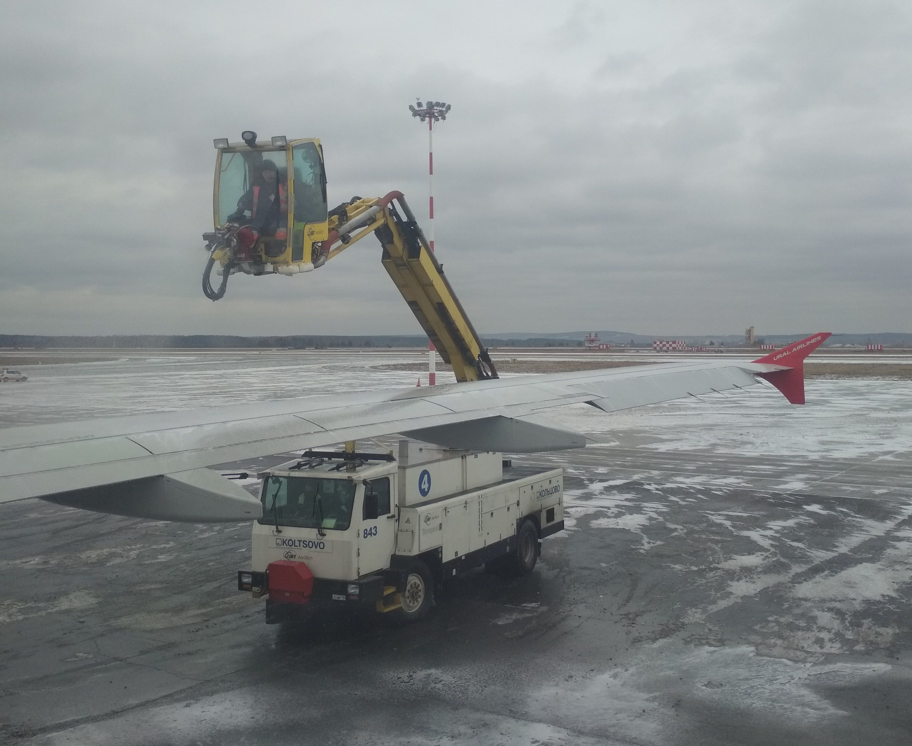 Антиобледенительная обработка крыла самолёта А-320 в аэропорту Кольцово (IATA: SVX, ICAO: USSS).